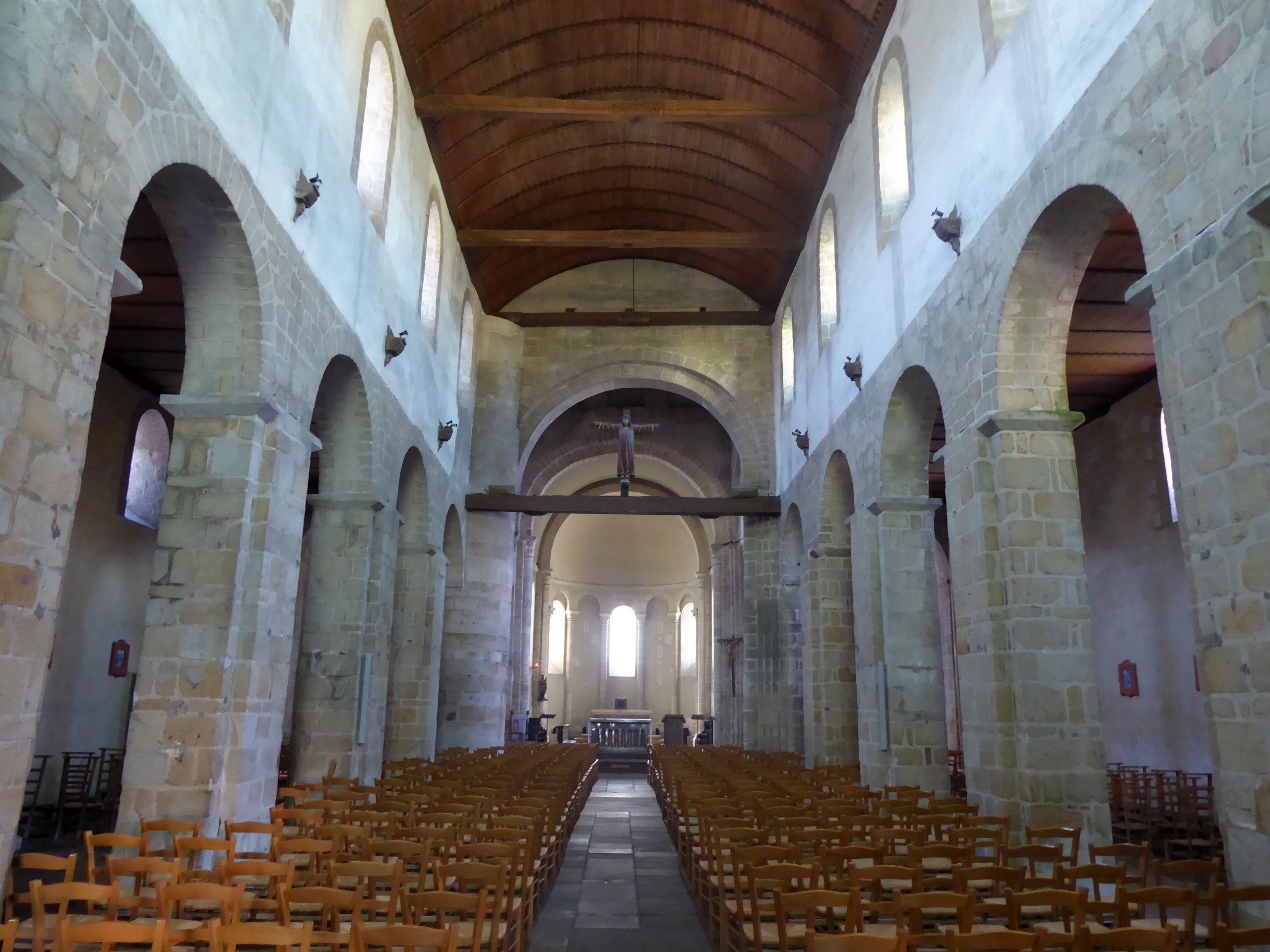 Eglise de Locmaria